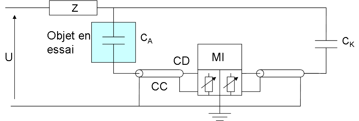 Montage 1c pour la mesure de décharges partielles d'après norme CEI